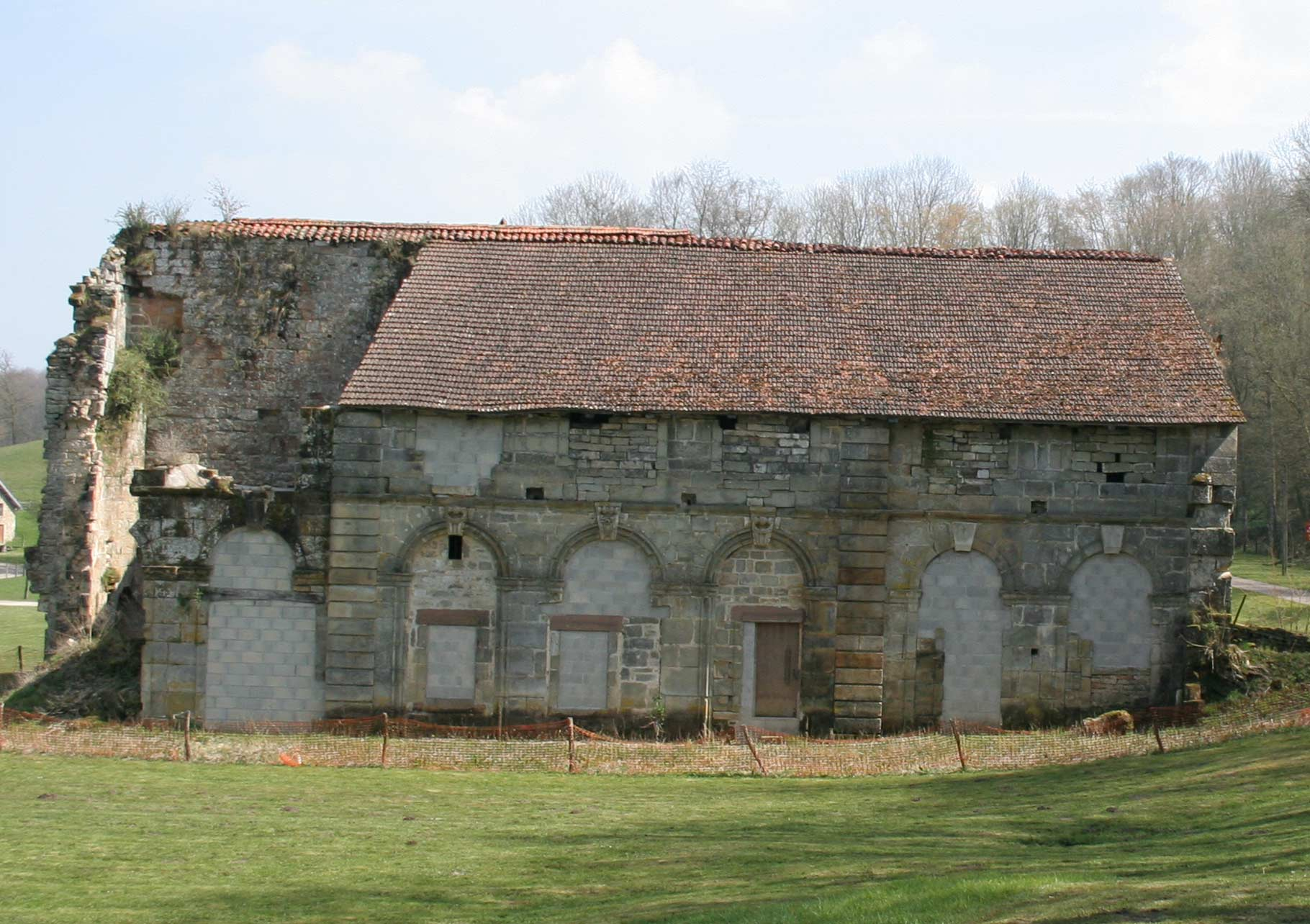 Morimond Vestige de la bibliothéque en 2007